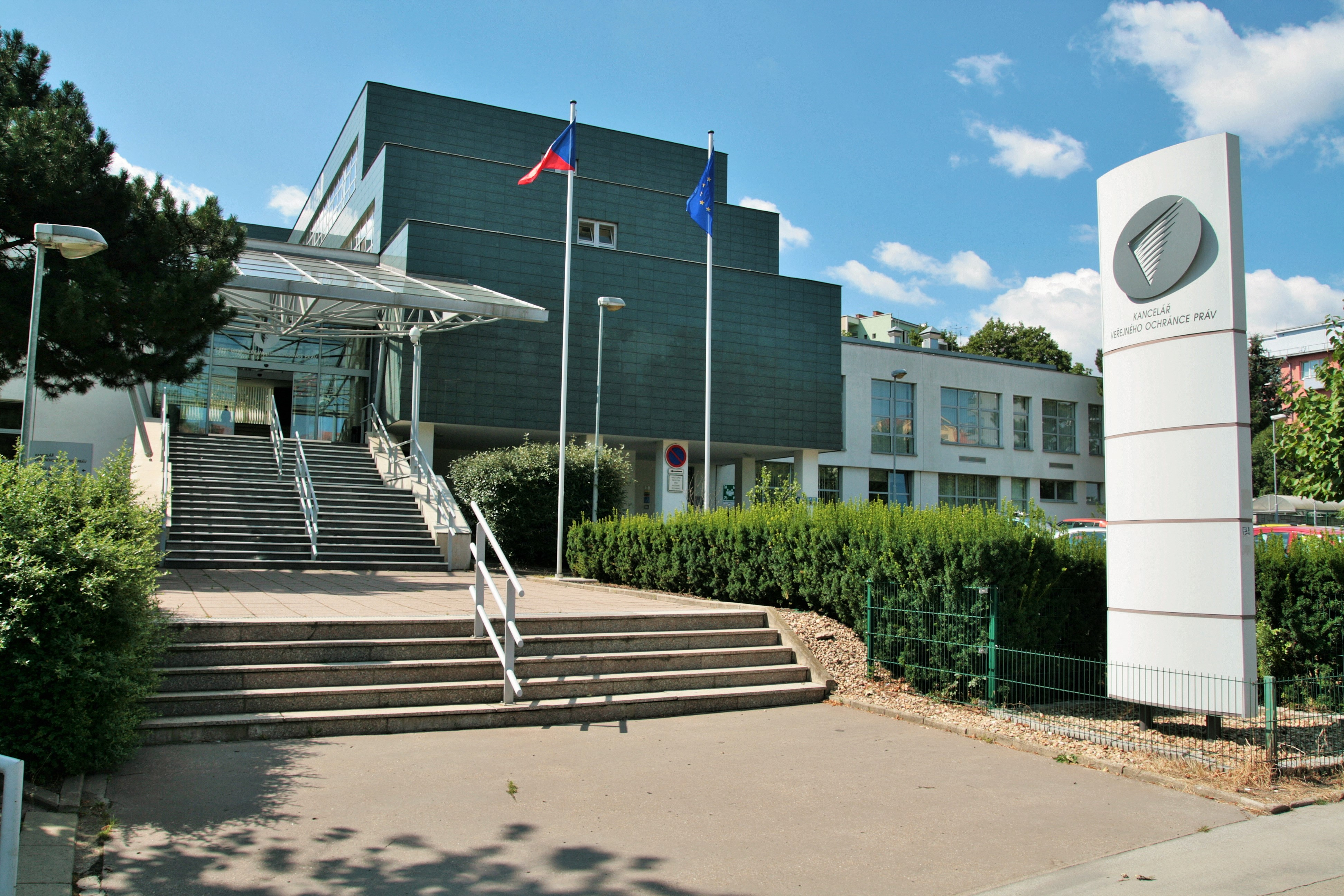 Kancelář veřejného ochránce práv (ombudsmana), Údolní 39, Brno. Celkový pohled z ulice.